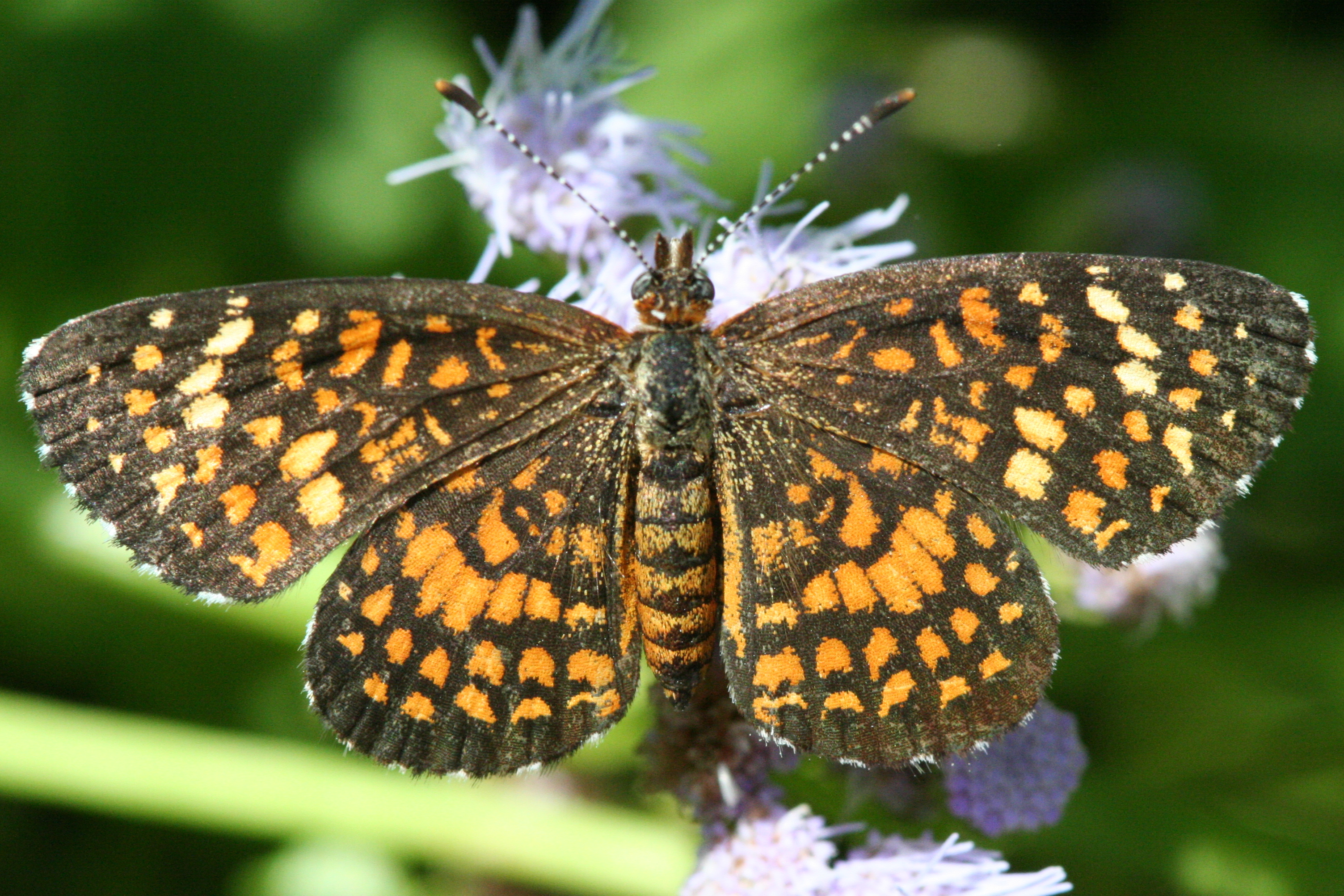 Elada checkerspot (Texola elada)